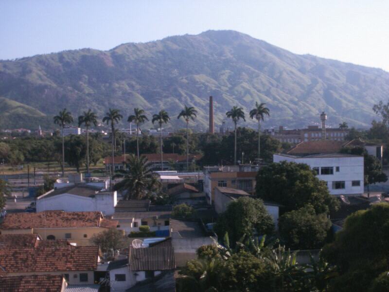 Vista Aérea com a Fabrica Bangu ao fundo